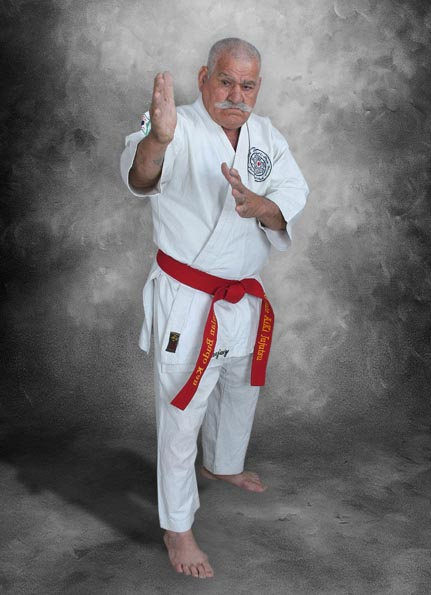 شیهان حیدرعلی شجاعی